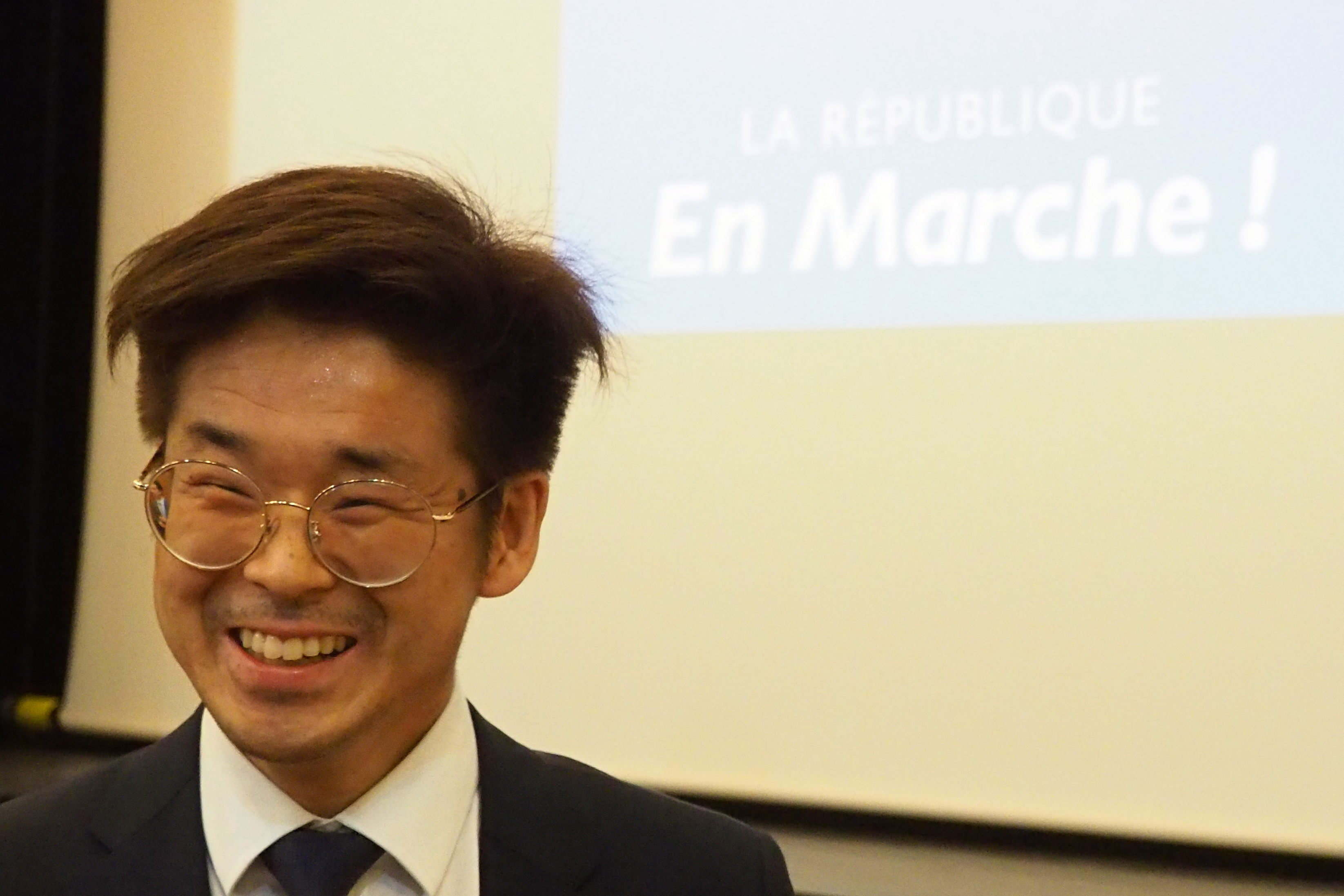 Joachim Son-Forget